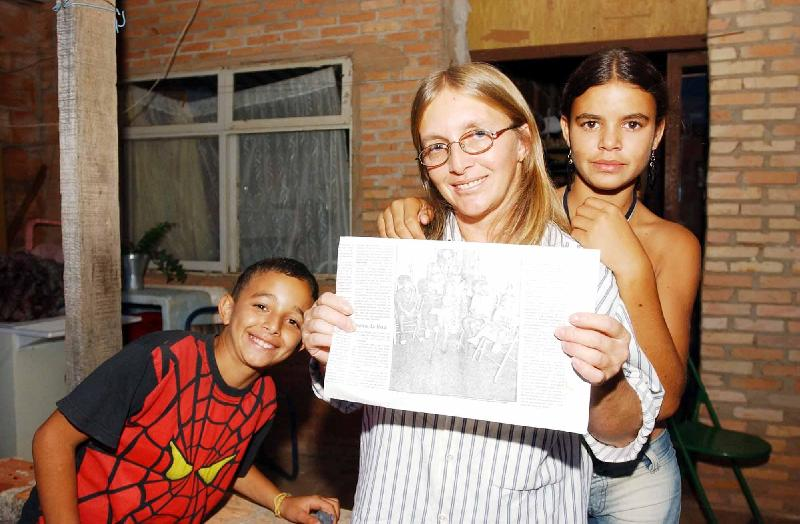 Selma Ferreira, a beneficiária n. 1 do Bolsa Escola, implantado no Distrito Federal em 1995. Foto: Wilson Dias/ABr